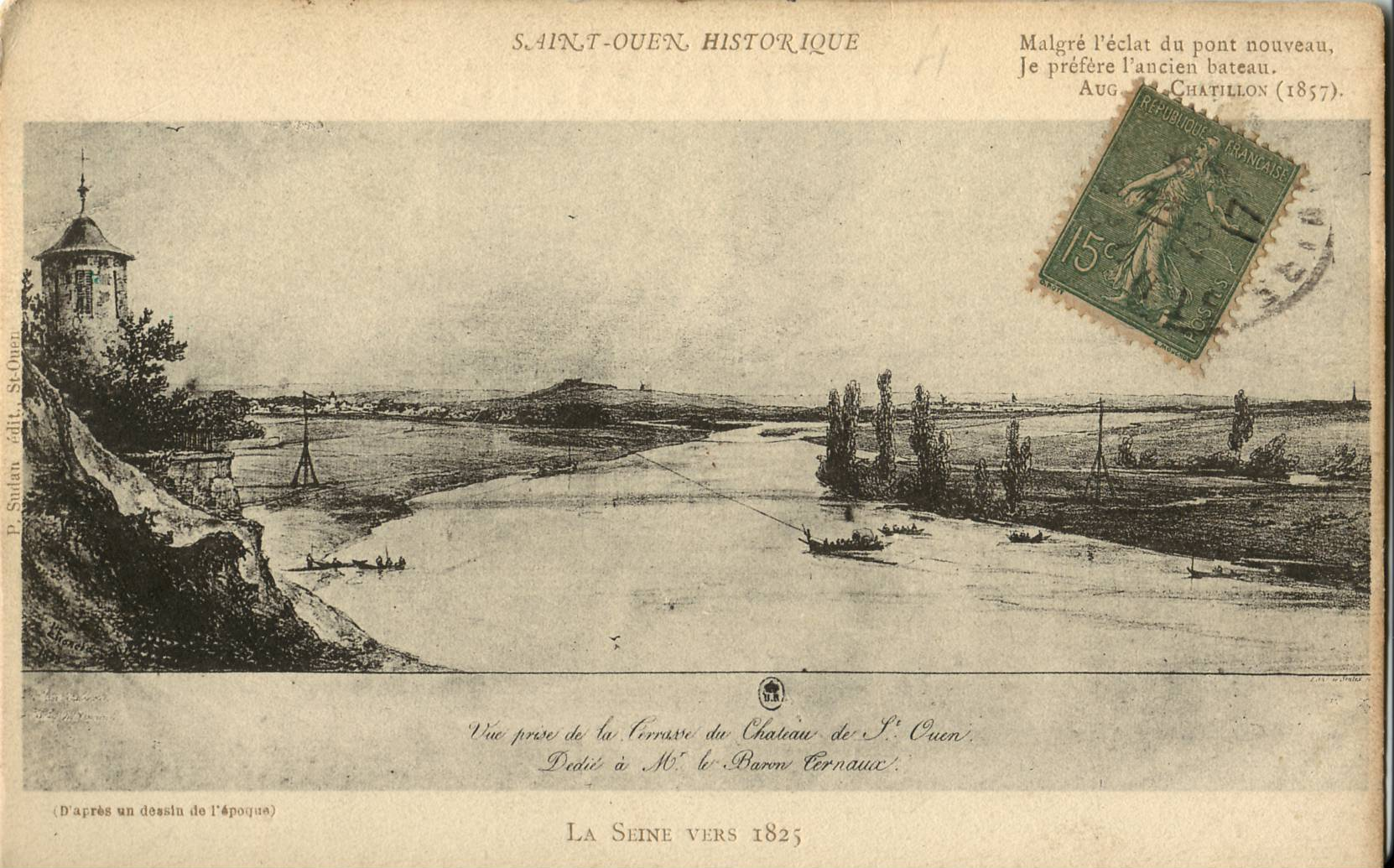 Carte postale ancienne, sans mention d'éditeur :Saint-ouen historique - La Seine vers 1825 (d'après un dessin de l'époque) : vue prise de la terrasse du Château de Saint-Ouen, dédié à M. le Baron Ternaux